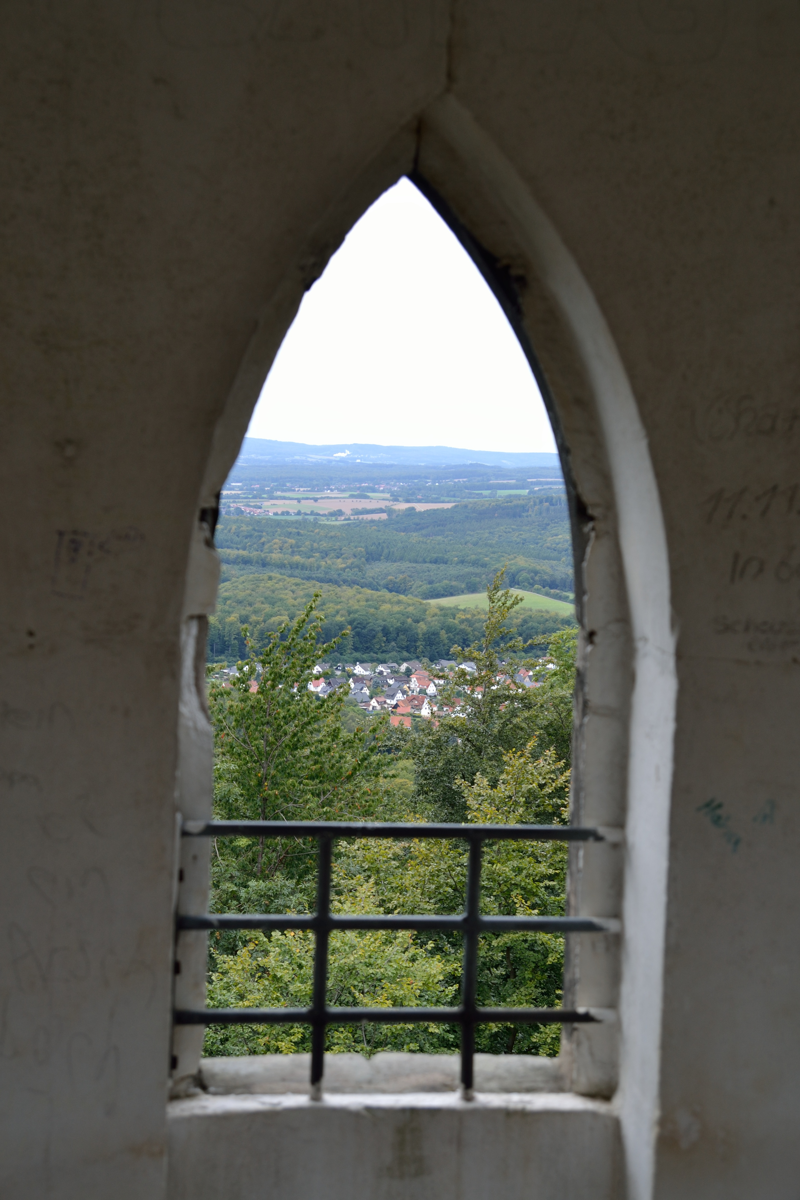 This is a photograph of an architectural monument. Kahlenbergturm